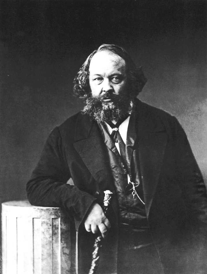 Portrait von Michail Alexandrowitsch Bakunin Quelle: Mikhail Bakunin Portrait ca. 1860